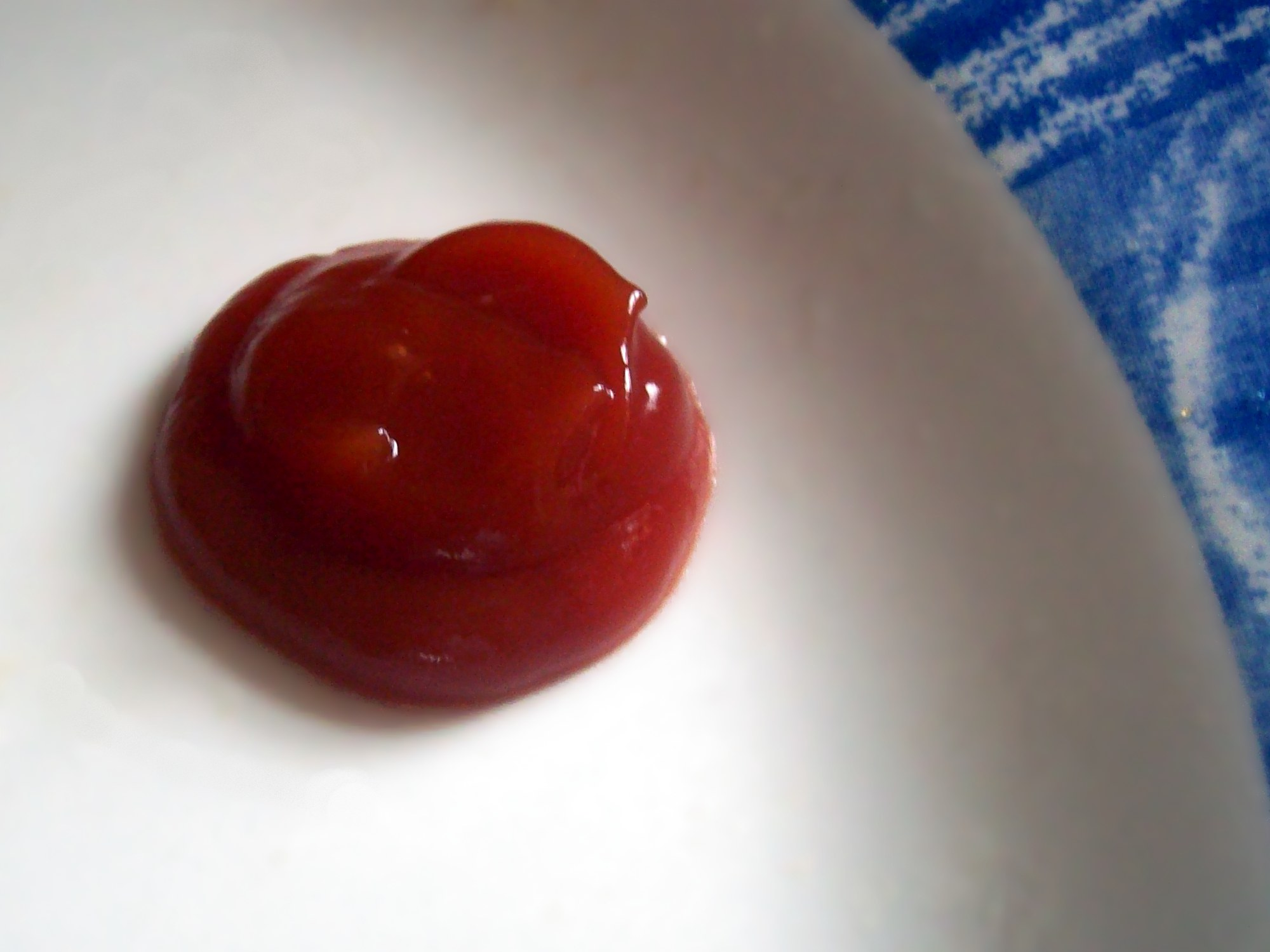 Ketchup